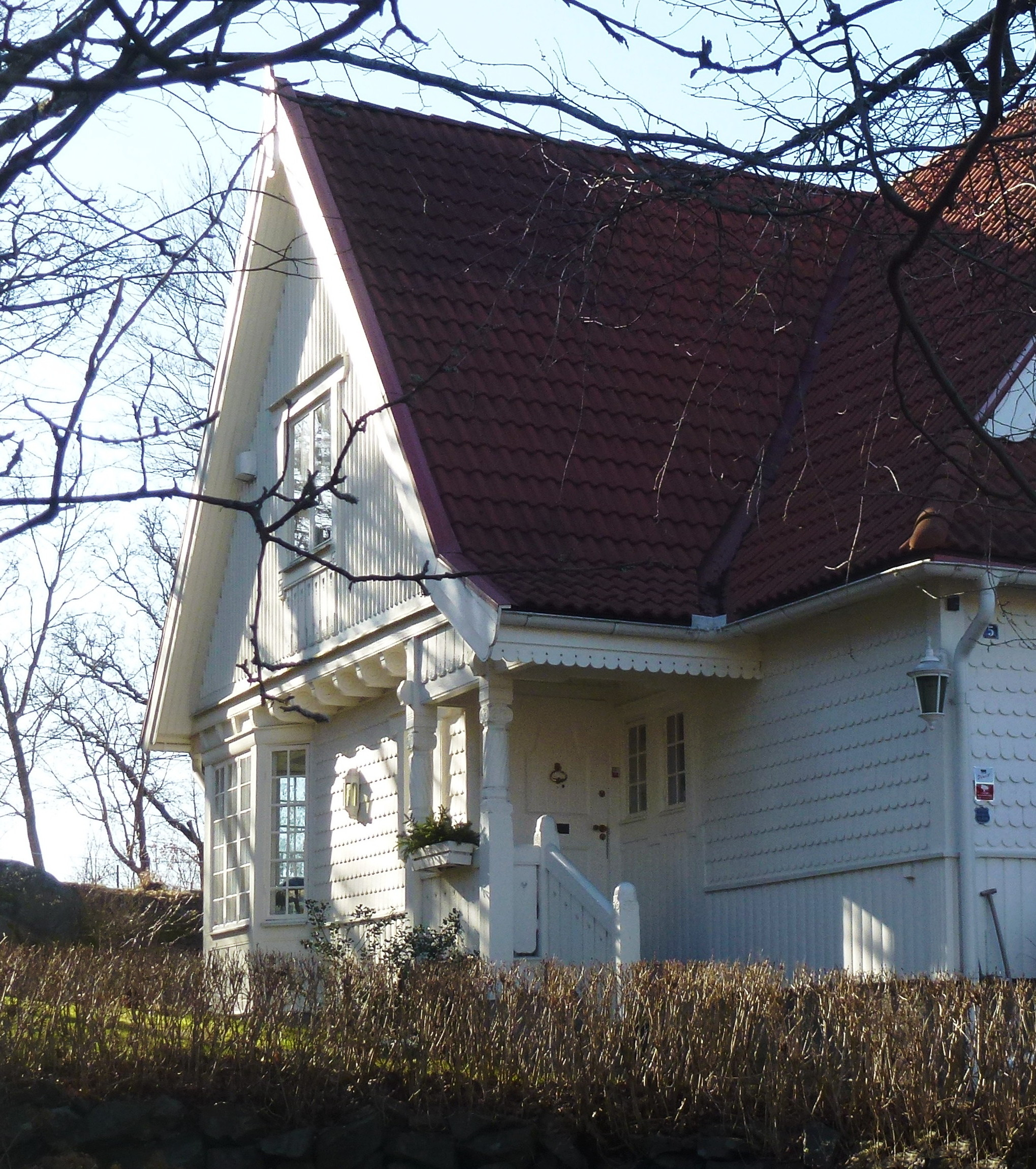 Villa vid Falkvägen 5 Älvsjö, utnämndes av tidningen "Vi i villa" till "Sveriges vackraste villa 2011". Den uppfördes 1912 av bildhuggare Carl Gustaf Ivar Cederwall som en jaktstuga inspirerad av Anders Zorns villa i Mora och tog fyra år att färdigställa.